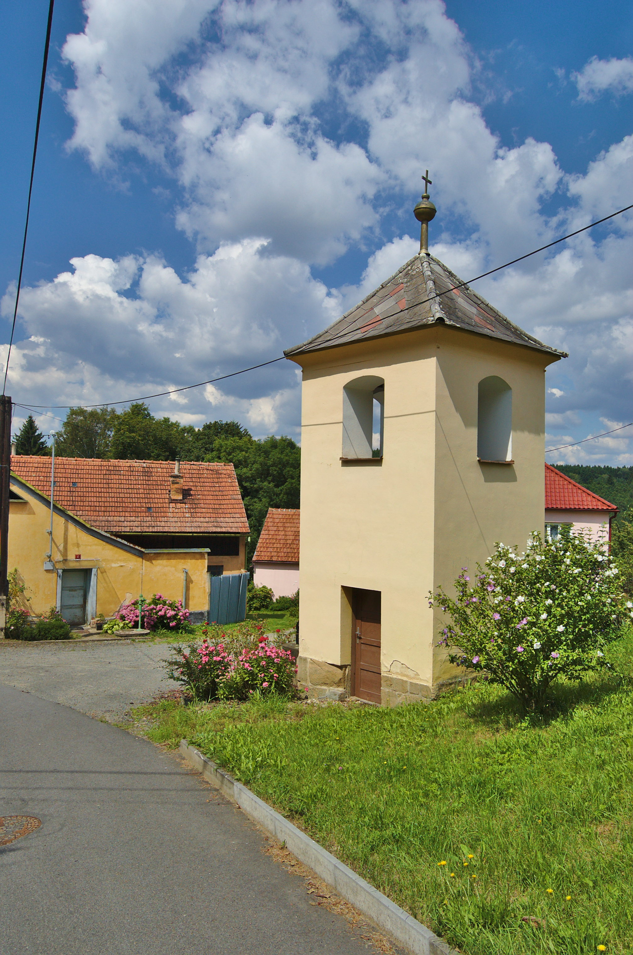 Zvonice, Hrádkov, Boskovice, okres Blansko